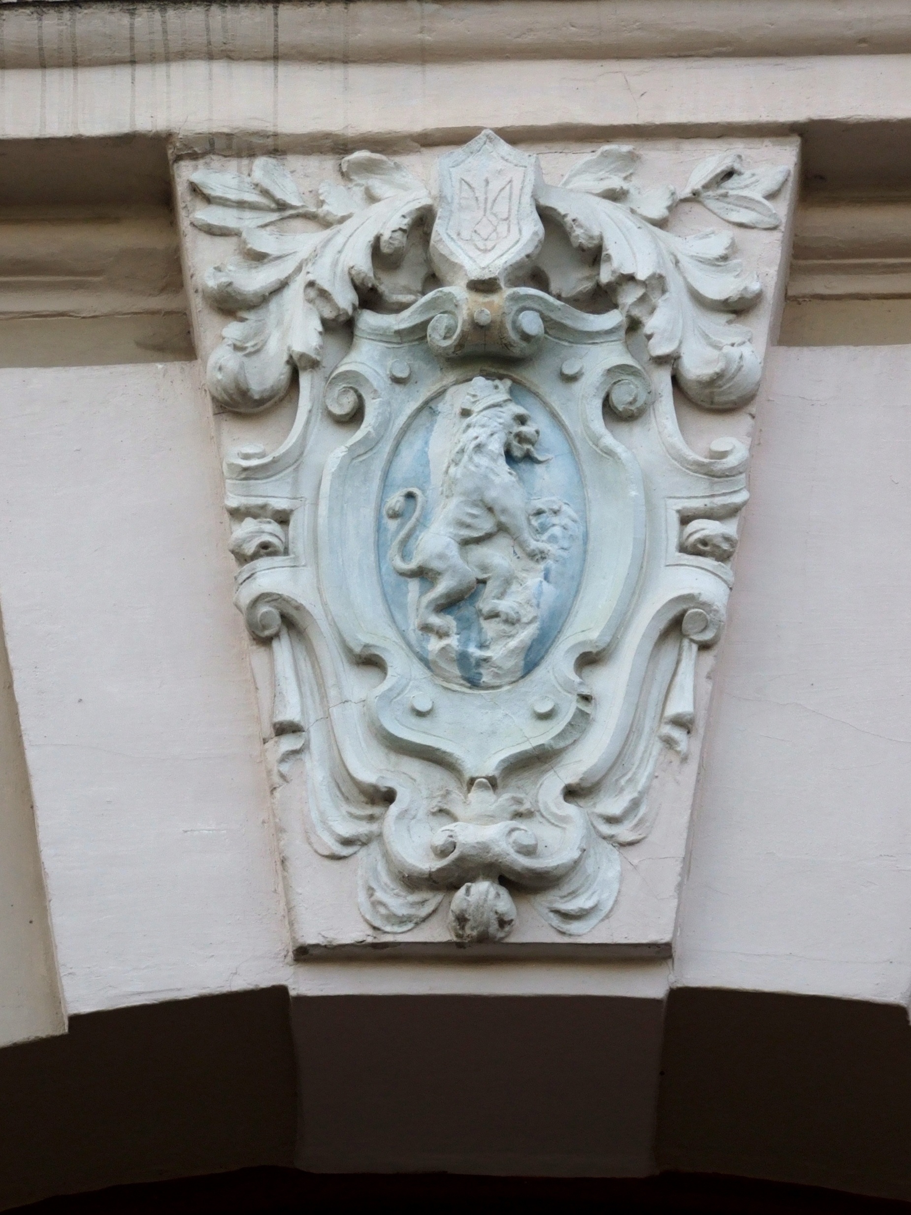 Народний дім, 1900 р.